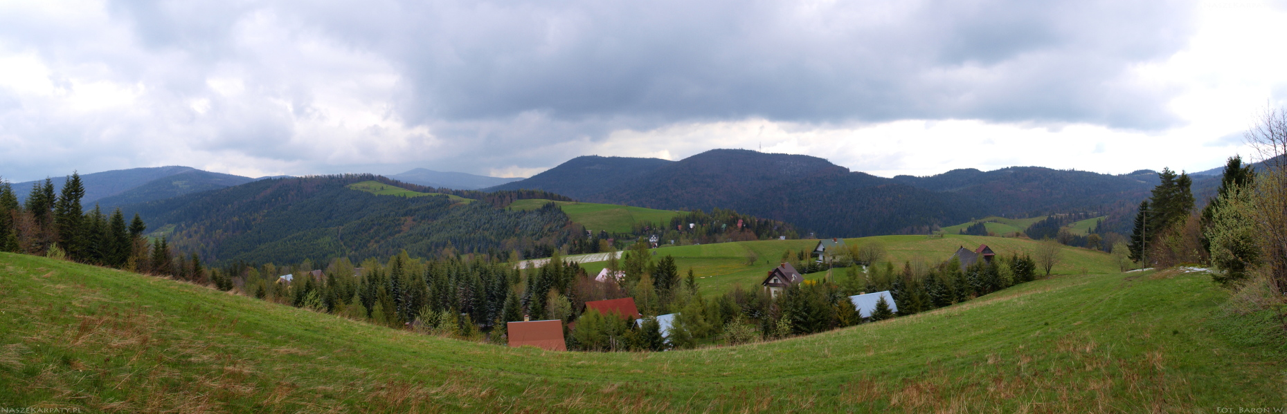 Przysłop (750 m n.p.m.) – przełęcz na granicy Beskidu Wyspowego i Gorców, między Myszycą (Beskid Wyspowy) a Jaworzynką (Gorce).